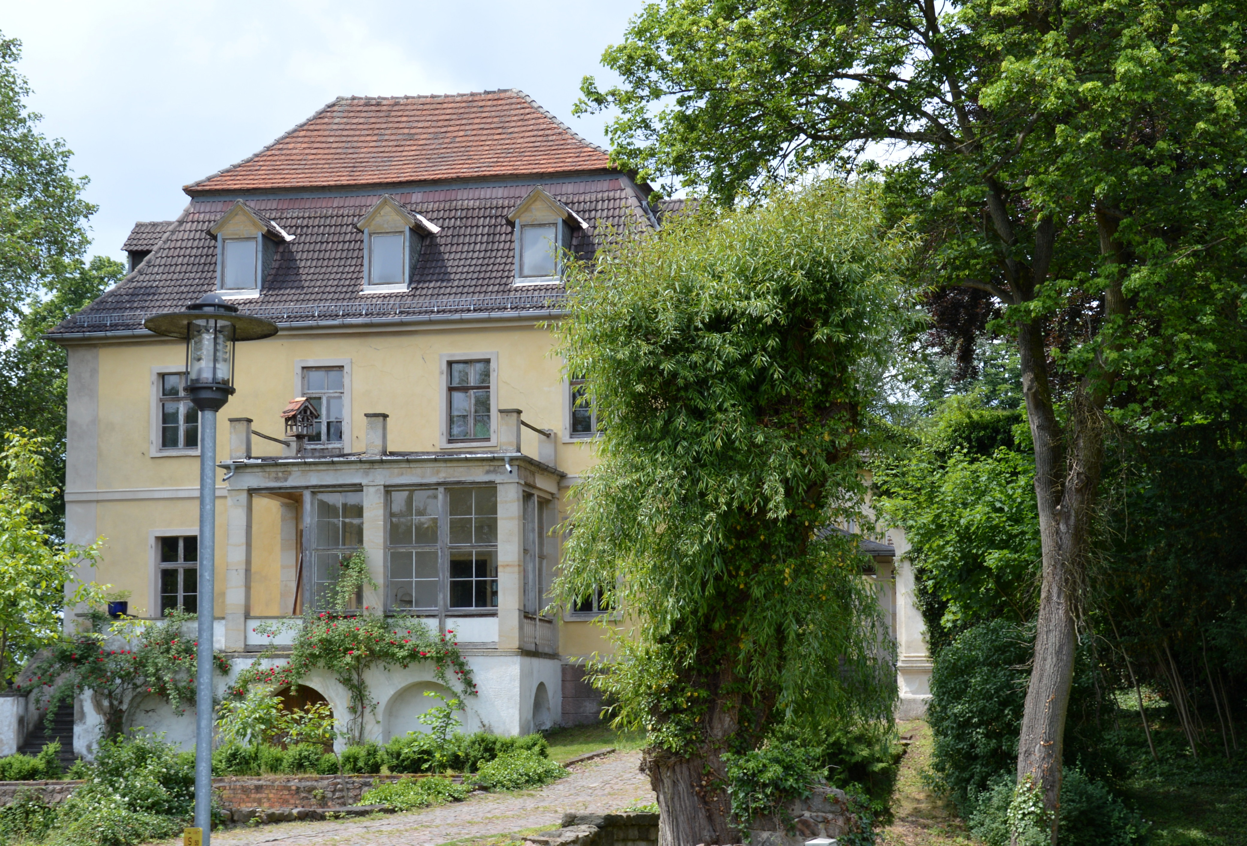 Burg Grabow